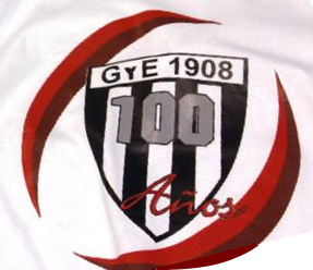 Escudo de Gimnasia y Esgrima (Mendoza) de los 100 años.